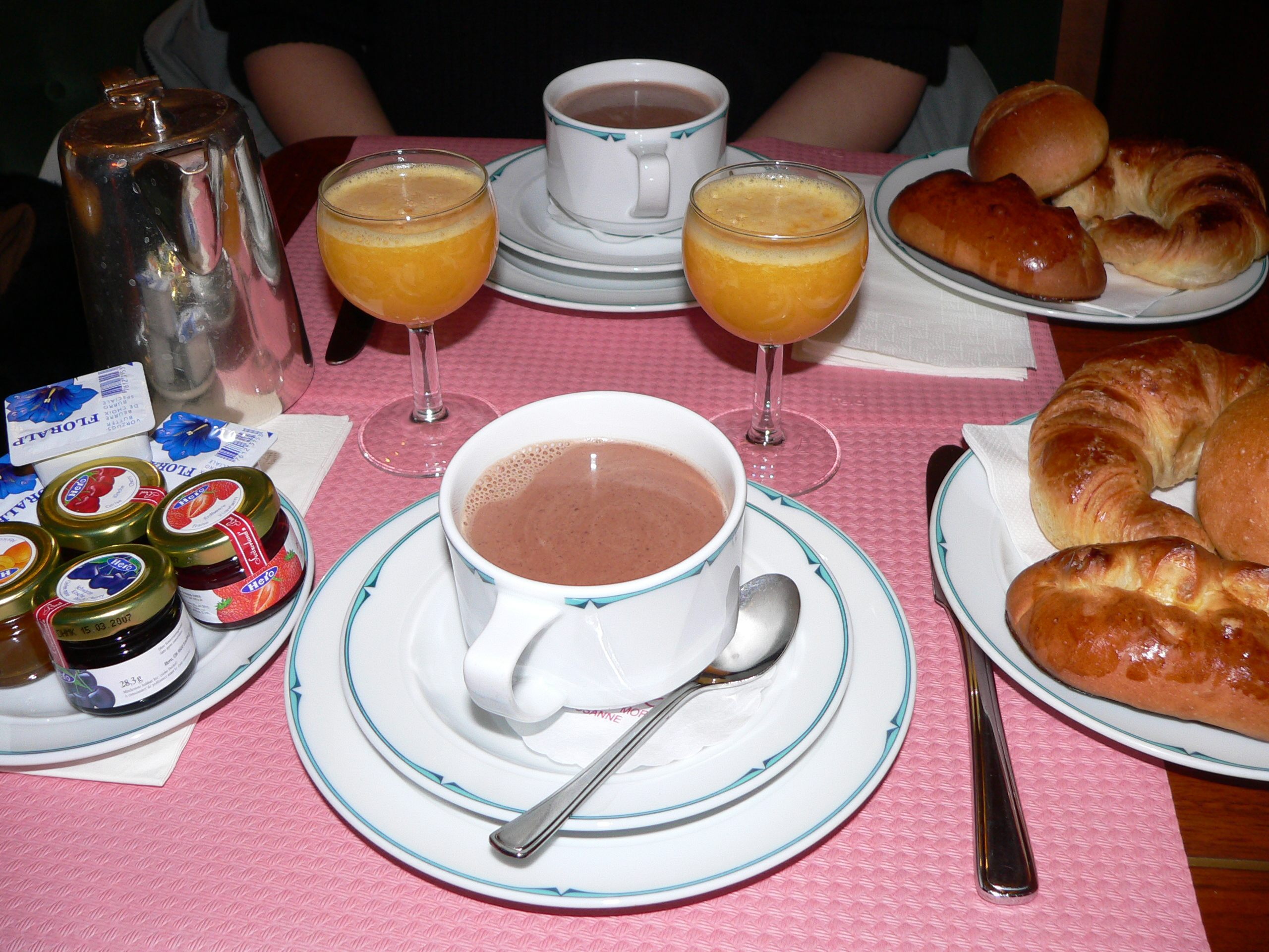 Déjeuner (petit déjeuner) en Suisse